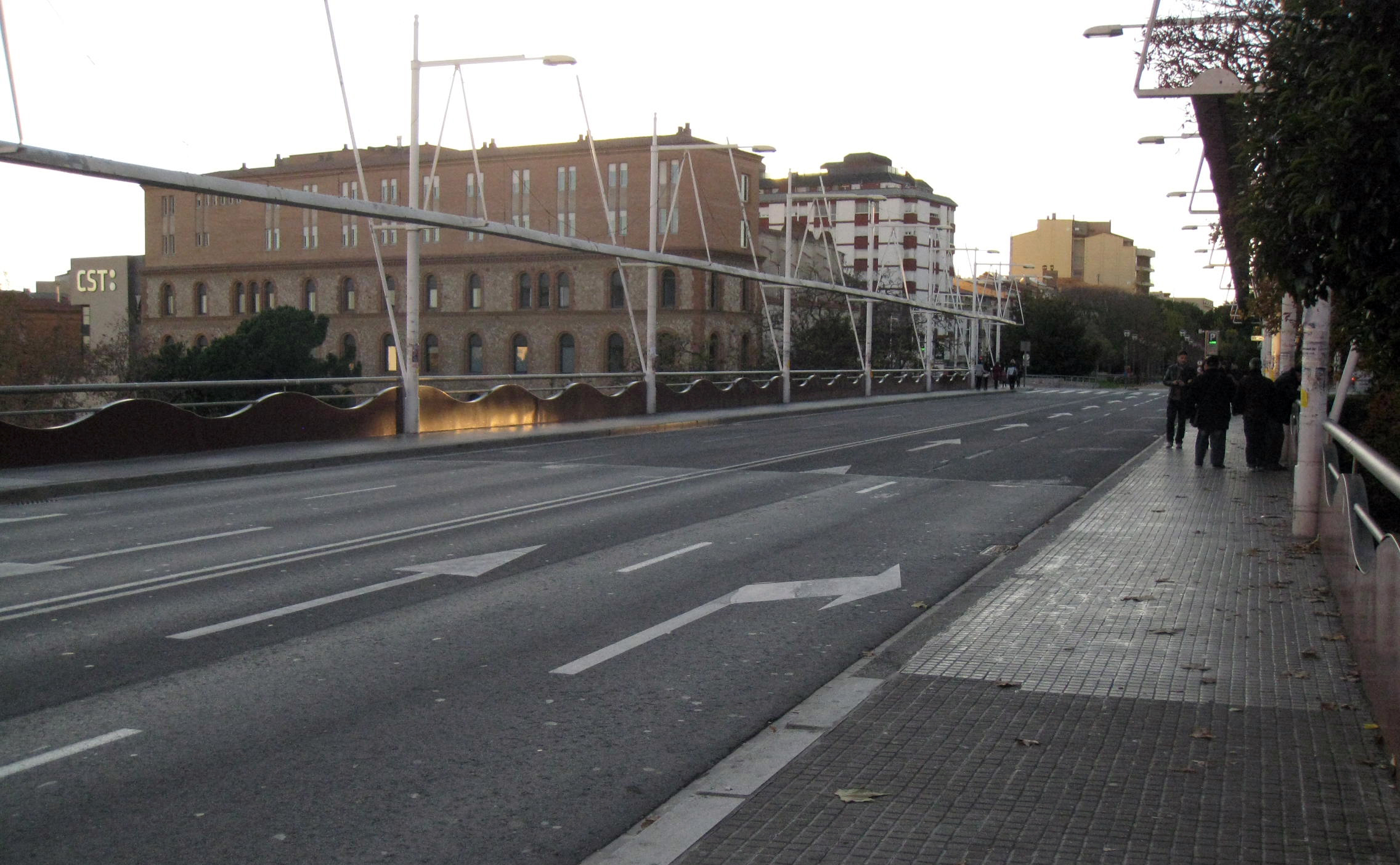 Pont del Passeig (Terrassa) Object location41° 33′ 48.62″ N, 2° 01′ 05.76″ E